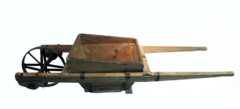 Carretilla, Manises, 1930 (para transportar pasta)